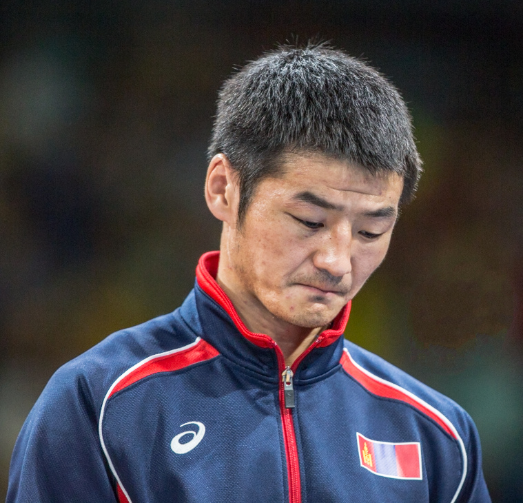 Medal Ceremony Men's 60 kg, Rio Olympics, Otgondalai Dorjnyambuu